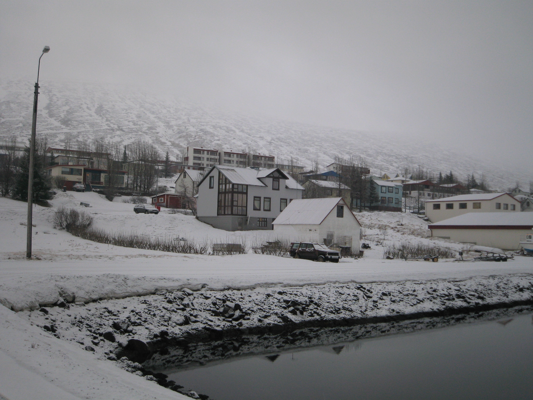 Faskrudsfjordur, Islandia 2007